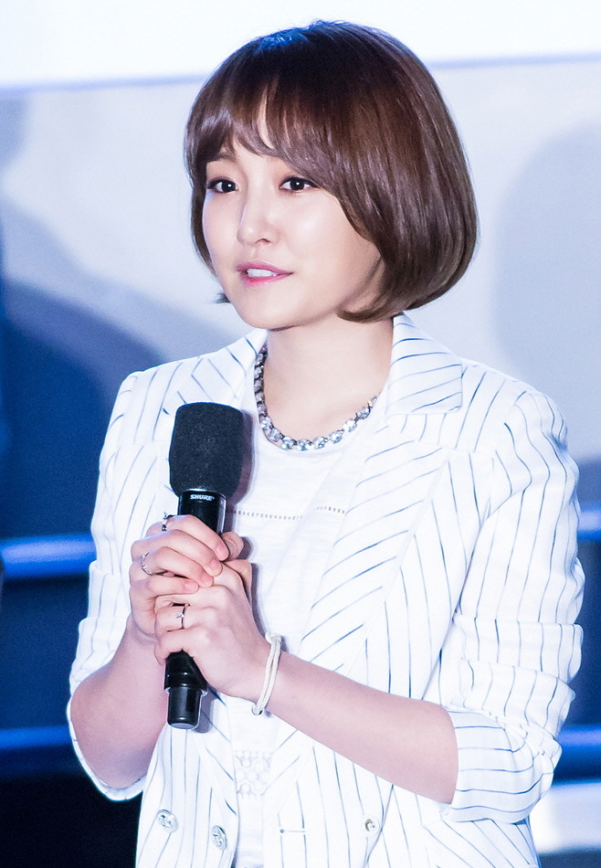 150410.봄바람콘서트.윤하